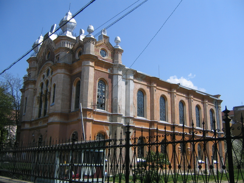 Synagogue, Oradea, Romania